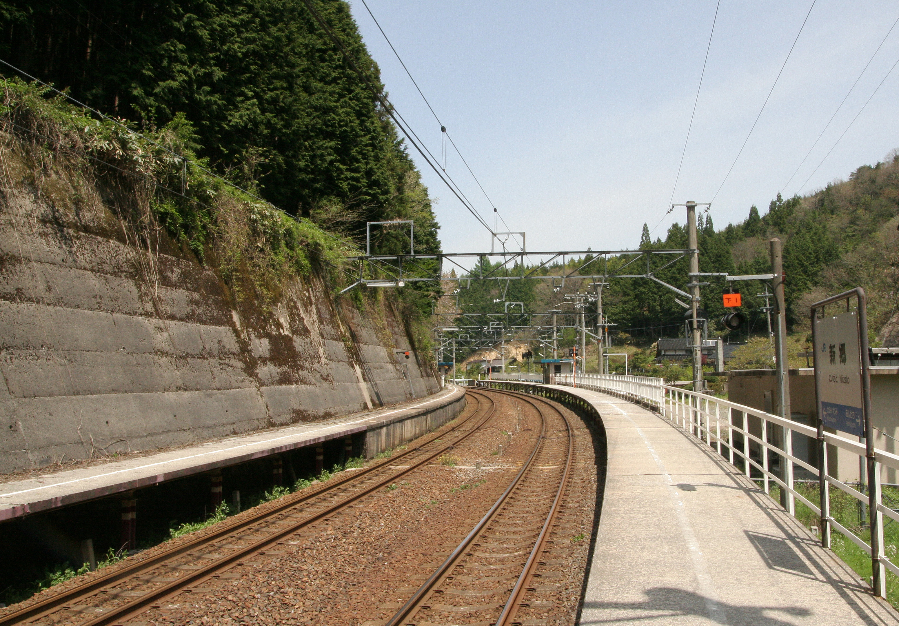 新郷駅の構内